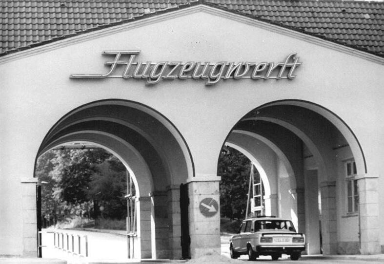 Dresden, Flugzeugwerft, Einfahrt 26.8.90 Dresden: Das Verteidigungsministerium der DDR hat bestätigt, daß derzeit zehn irakische Jagdflugzeuge des Typs MIG-21 in der Flugwerft gewartet werden, schloß aber nach Bekanntwerden entsprechender Vorwürfe die Auslieferung der Flugzeuge an den Irak aus. ADN-Matthias Hiekel